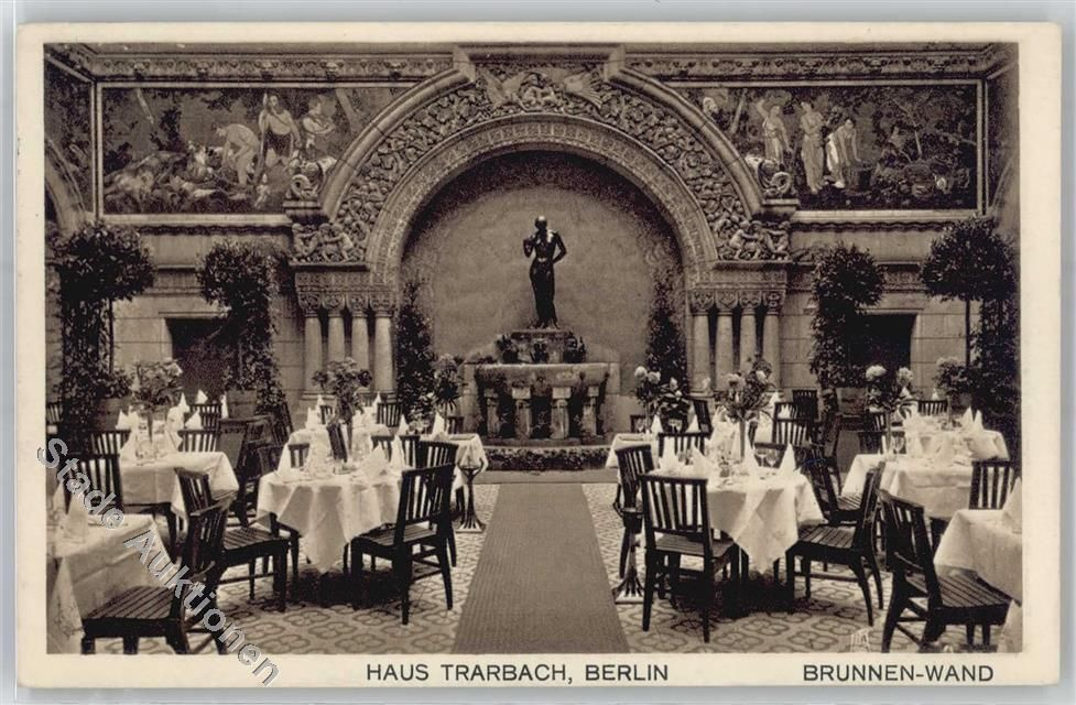 Brunnenwand im Gartenhof Haus Trarbach Behrenstr. 47, Berlin, errichtet 1906. Brunnen von Richard Walter. Brunnenfigur von Otto Stichling (1866-1912)